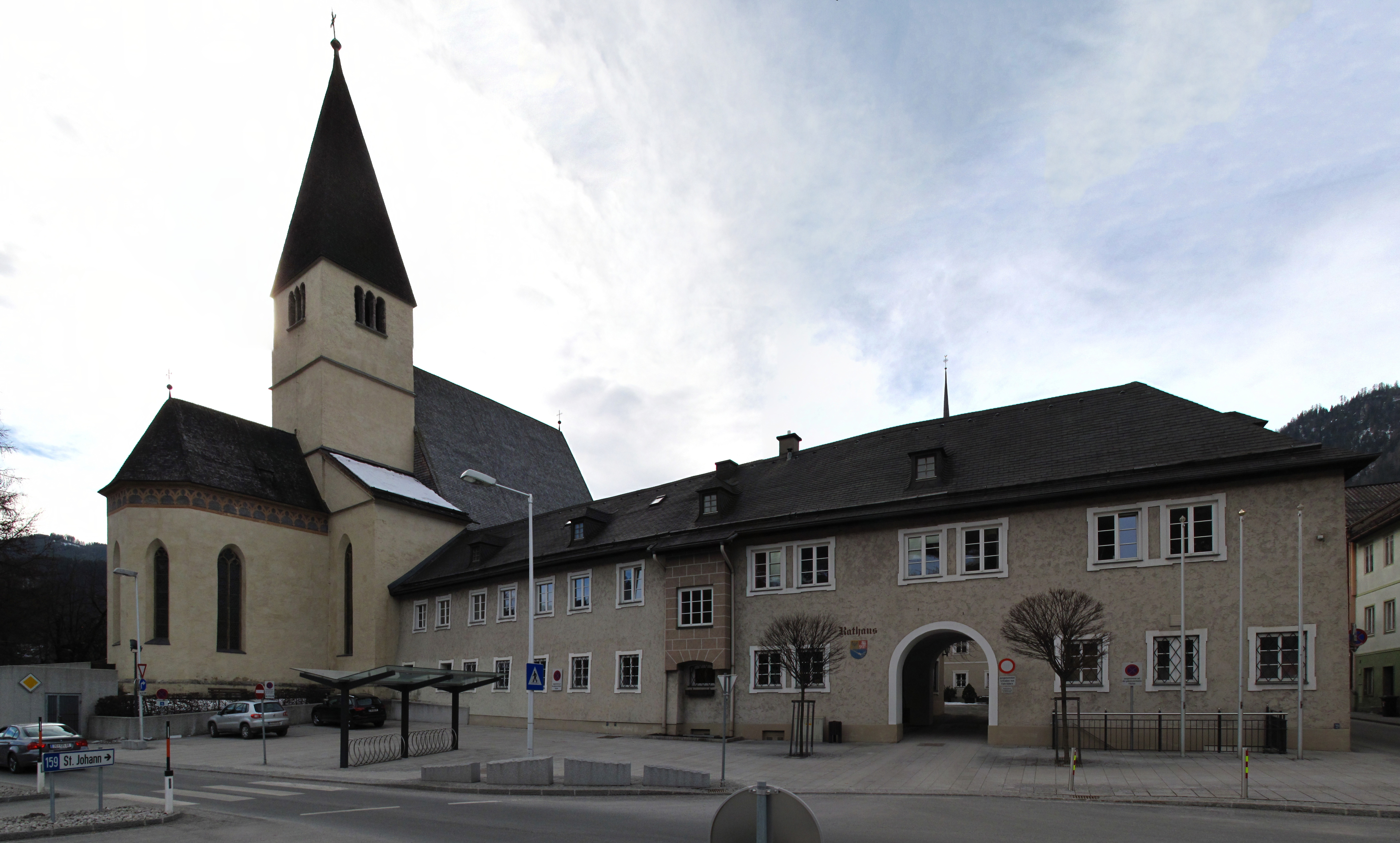 Rathaus, 5500 Bischofshofen, Rathausplatz 1